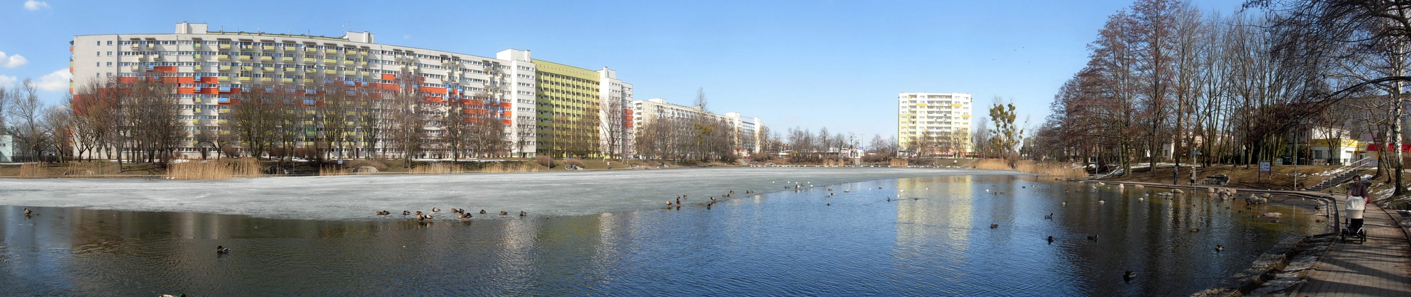 Park Balaton na osiedlu Bartodzieje w Bydgoszczy